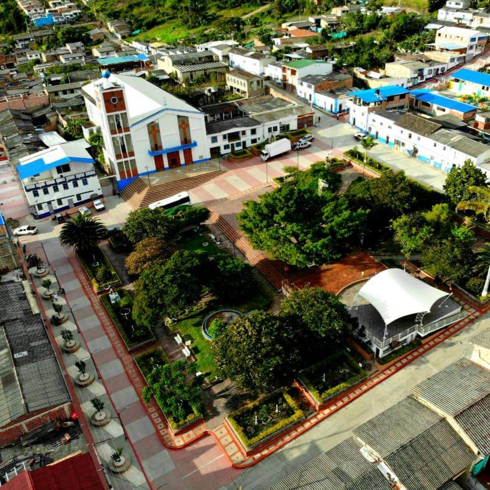 el parque rodeado de zonas verdes y plazoletas zonas de encuentro para esparcimiento la población